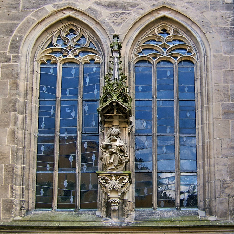 Evangelische Stadtkirche in Schorndorf, Deutschland